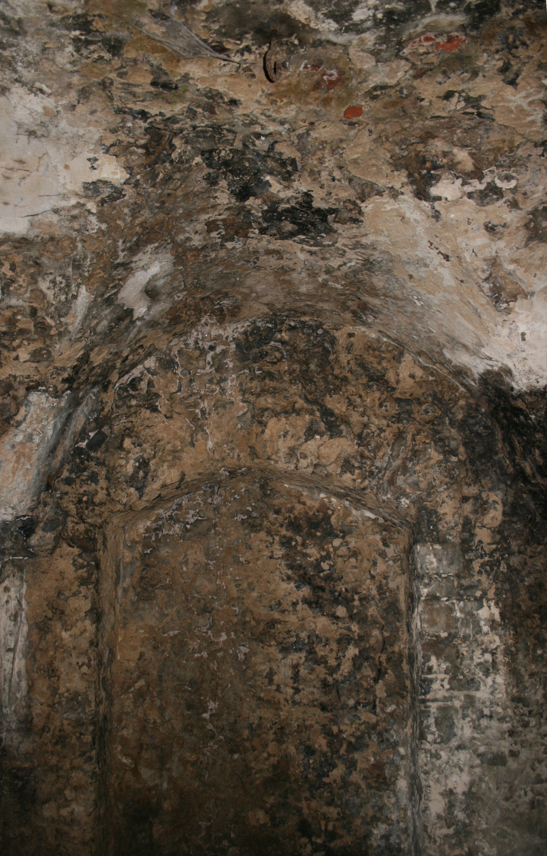 Klosterruine St. Wolfgang bei Hanau, Hessen, Inneres der Sakristei. Blick auf die westliche Wand mit Nische für einen Altar(?). An der Decke Reste des Gewoelbeverputzes sowie ein Eisenhaken (wohl Aufhaengung fuer eine Lampe?).